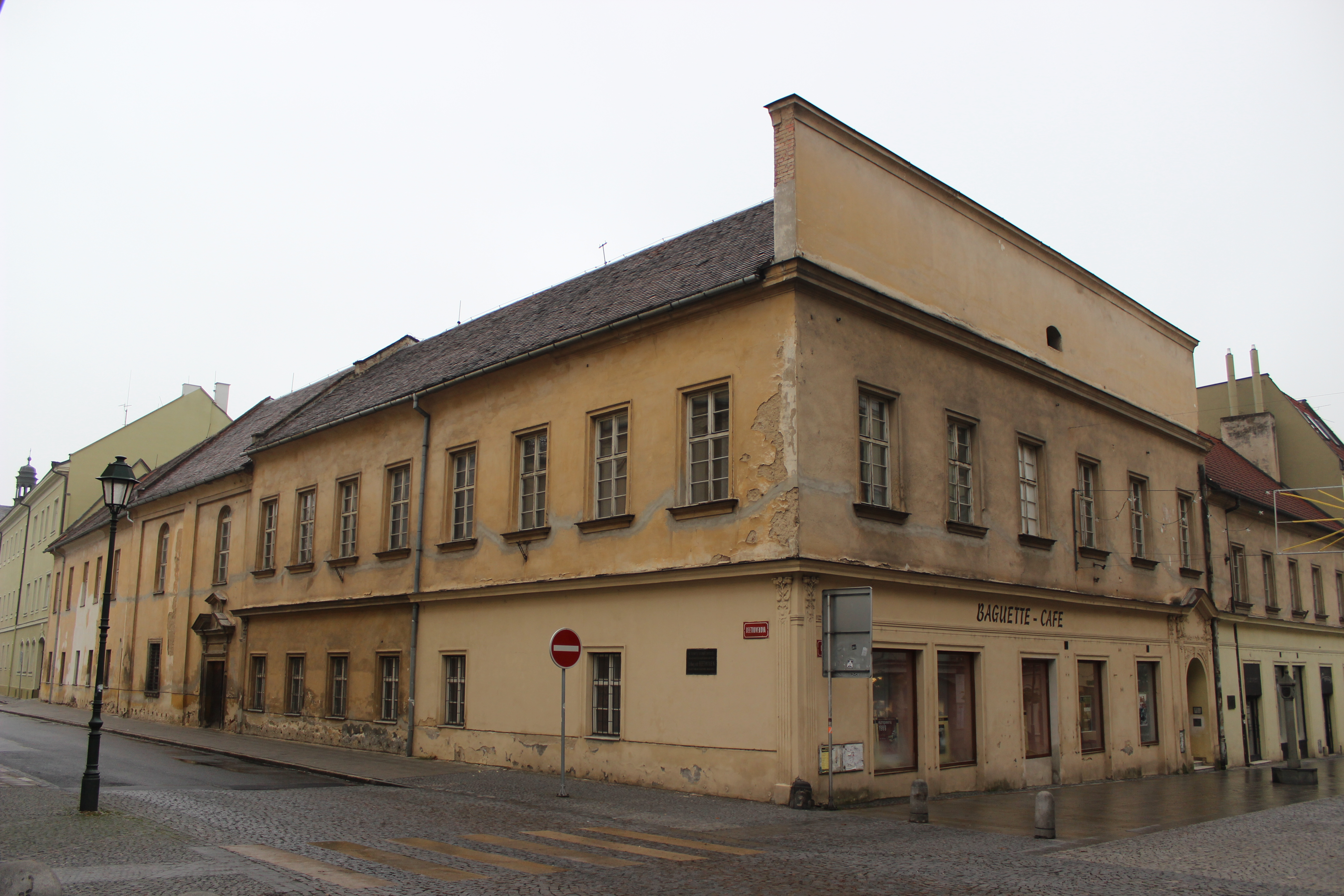 Opavský dům, v němž pobýval Beethoven.